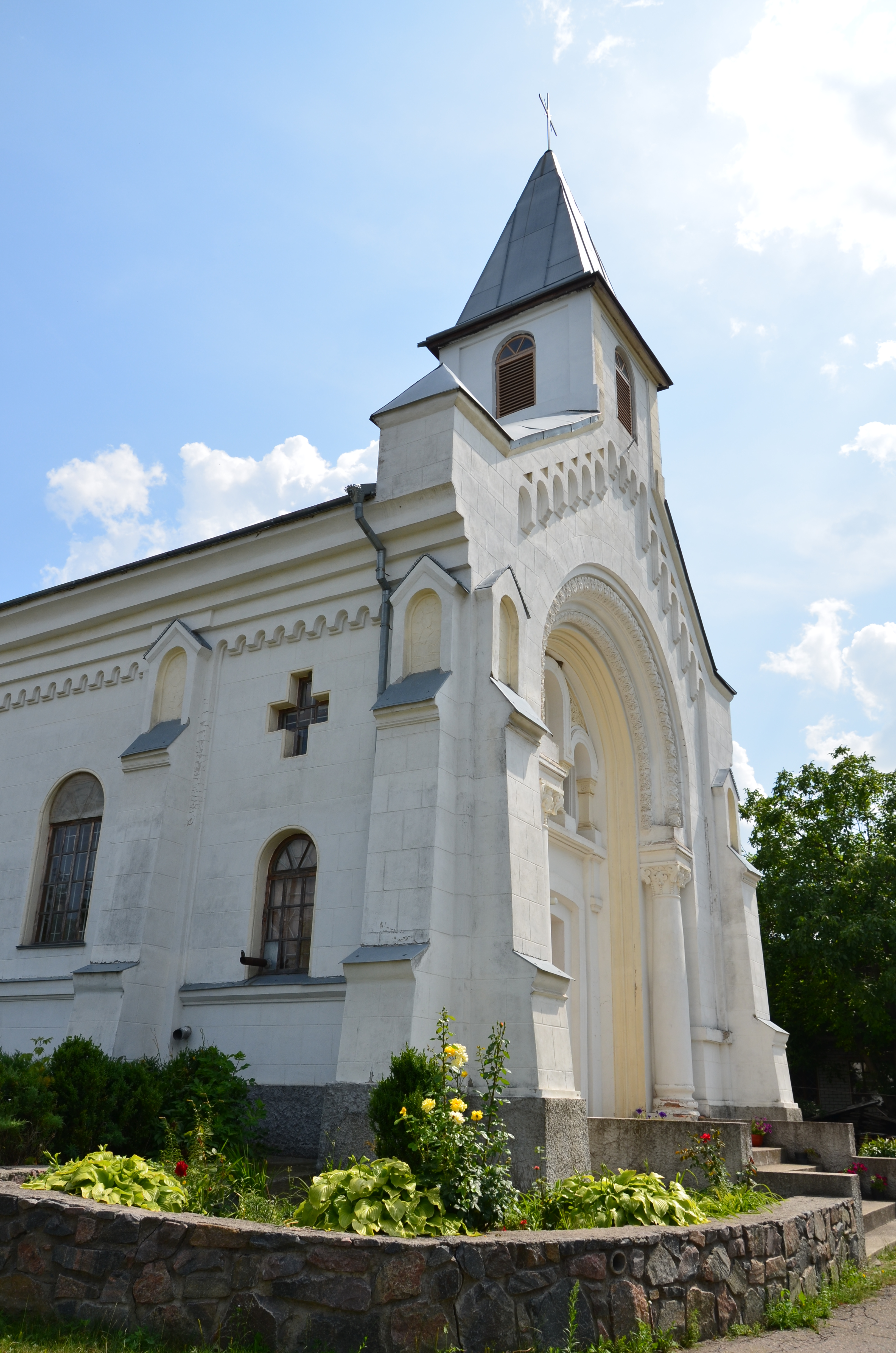 Приміщення римо-католицької церкви, Тальне